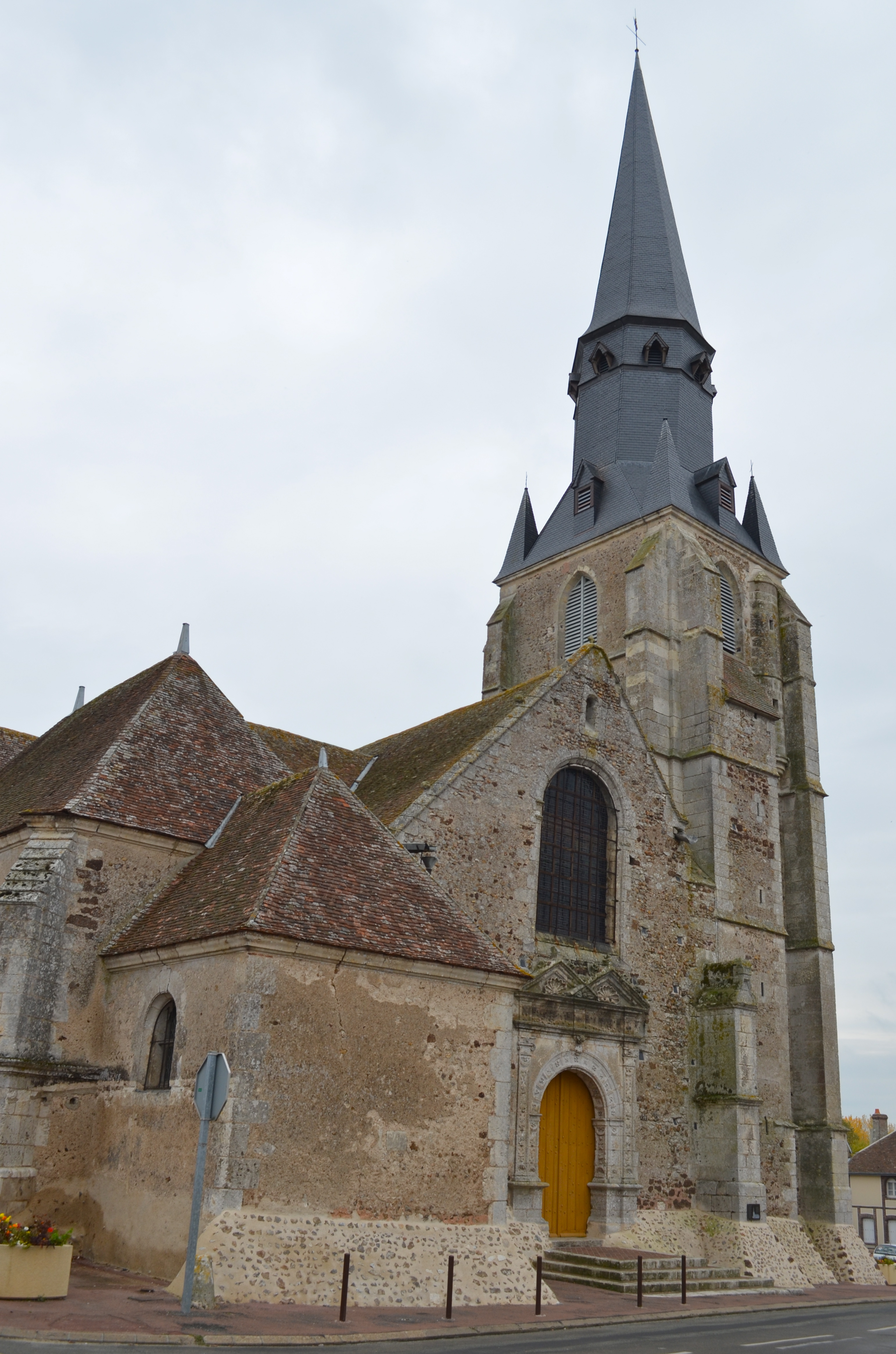 Eglise Notre-Dame - Yèvres (Eure-et-Loir)